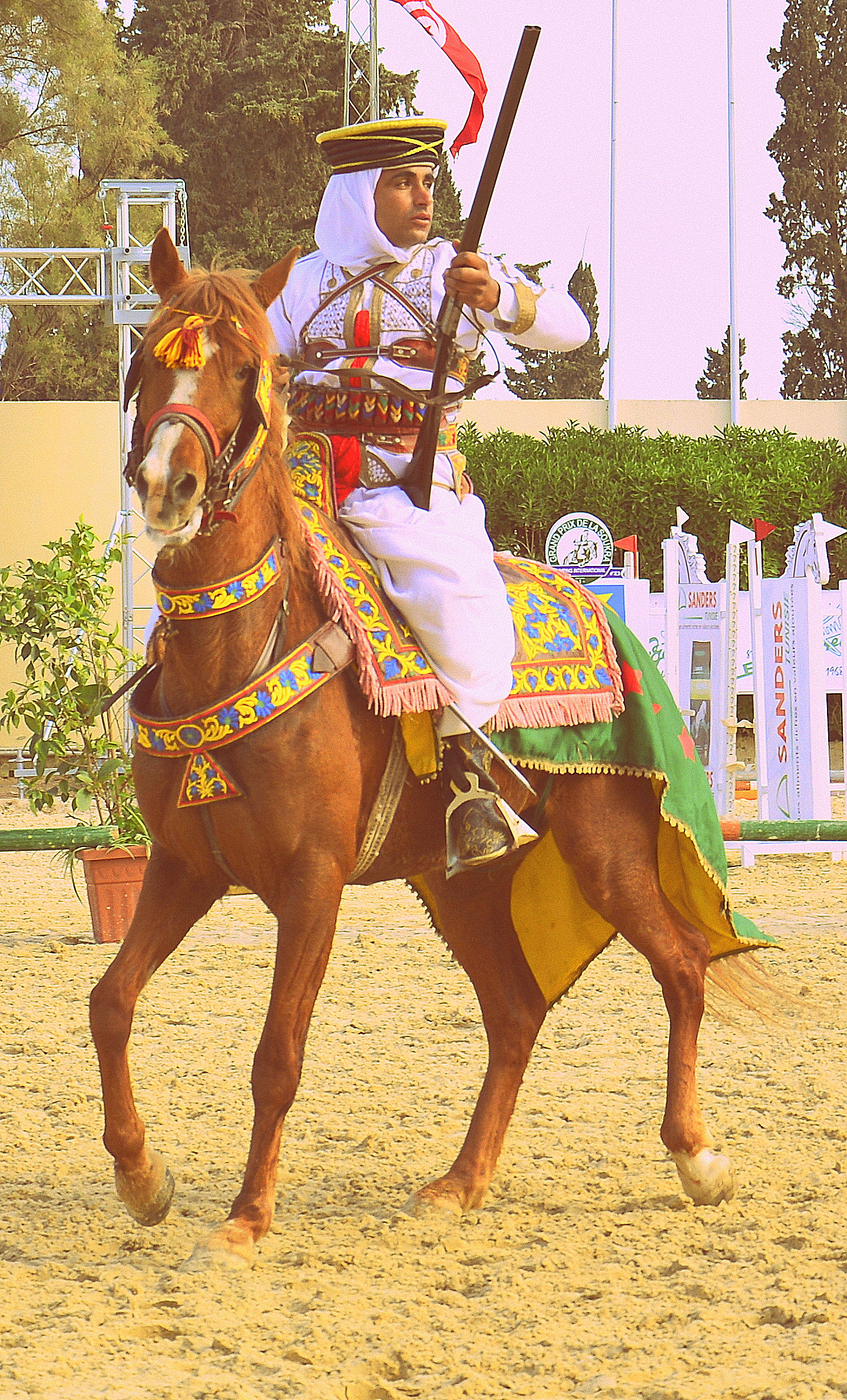 La tenue des chevaliers Tlilis de la Tribue Tlil du Kef This is an image of Cultural Fashion or Adornment from Tunisia